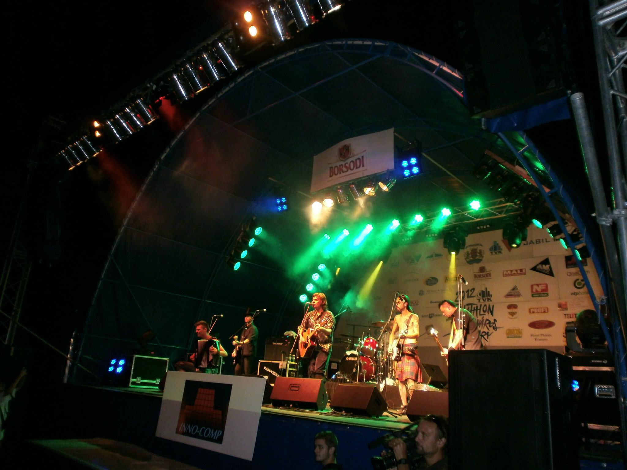 Paddy and the Rats en vivo.